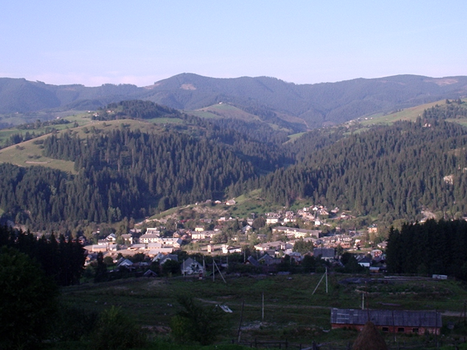 Вид на Путилу з гори біля цегельного заводу. Літо 2005.